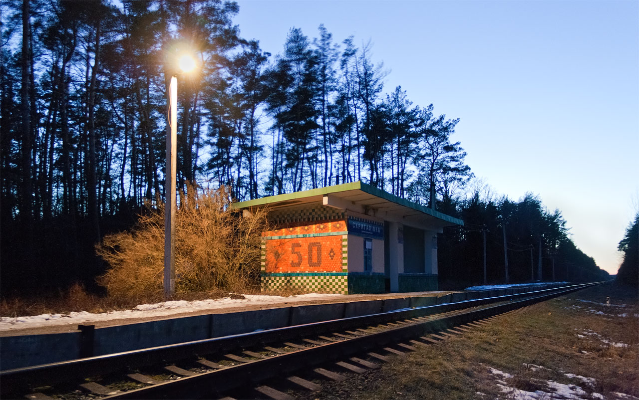 Вигляд в напрямку Житомира